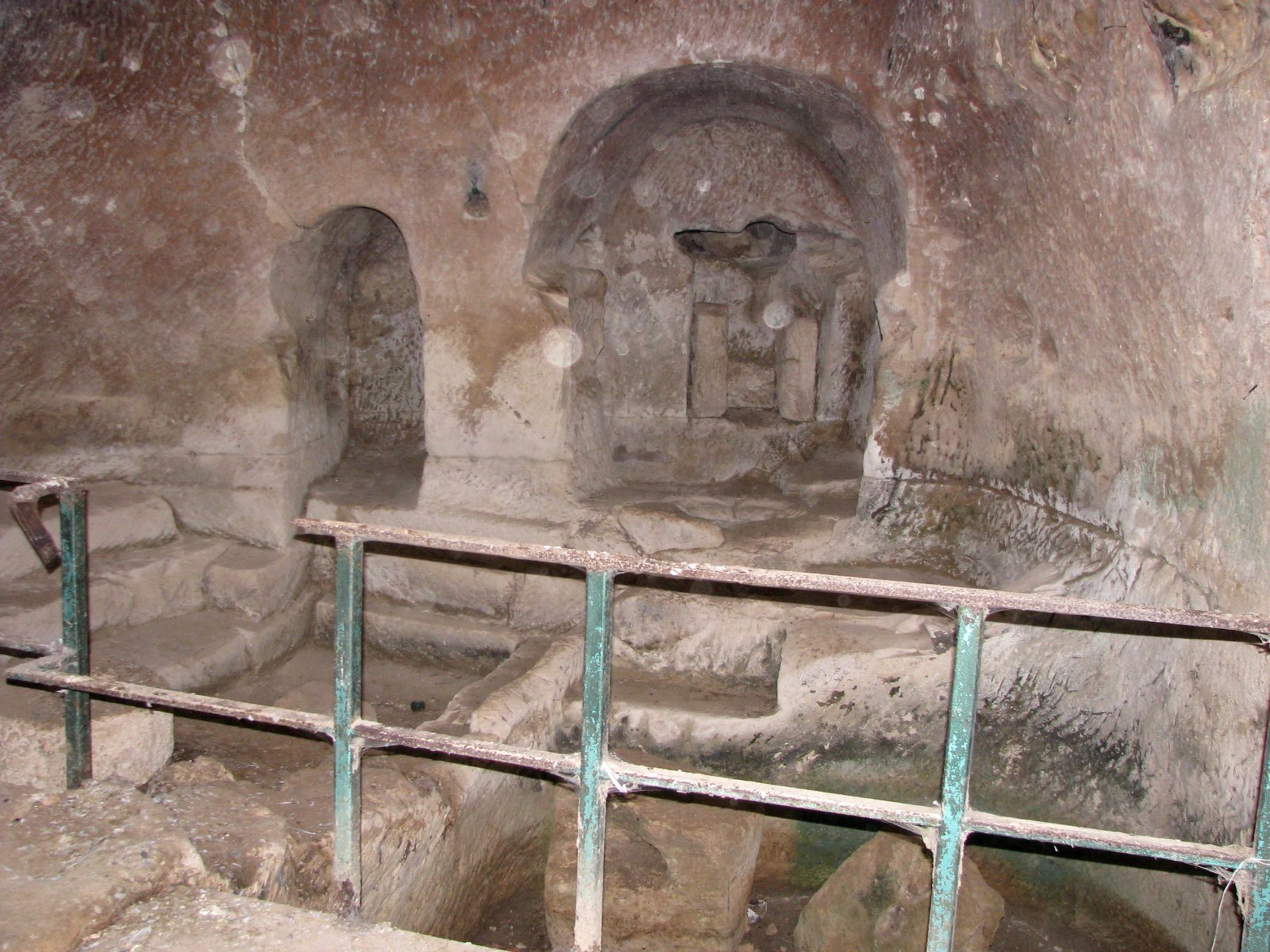 מערות חזן הוא שמה של מערכת מסתור בישראל מתקופת מרד בר כוכבא, הממוקמת מדרום למושב אמציה. היא מורכבת ממערות קארסטיות, חללים חצובים, מתקנים חקלאיים ובורות מים המקושרים זה לזה במנהרות ומחילות תת-קרקעיות. בתמונה בית בד תת קרקעי.